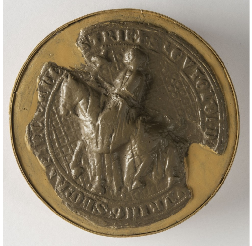 Siegelführer: Leutold von Kuenring, Obrister Schenk von Österreich Datierung: 1299 Typ: Abguss Form: rund Beschreibung Avers: Siegelführer in ganzer Figur zu Pferd, mit langem Mantel, Becher mit Deckel in der Rechten, Zügel in der Linken. Pferd im Schritt nach r., mit weit herabhängender Decke, darauf vorne und hinten ein Wappenschild (Kuenring). Untergrund mit Rauten und Sternen gemustert. Umschrift Avers: + SIGILLUM. LEVTOLDI . D[E . Ch]VERING . SUMMI . PINCERNE . [AV]STRIE Aufbewahrungsort Original: Graz LA (U 1588) Literatur: K. v. Sava, Die Siegel der Landes-Erbämter des Erzherzogthums Österreich unter der Enns im Mittelalter; in: Ber. u. Mitt. d. Alterthums-Vereines zu Wien 5 (1861) Tafel II Fig. 10.